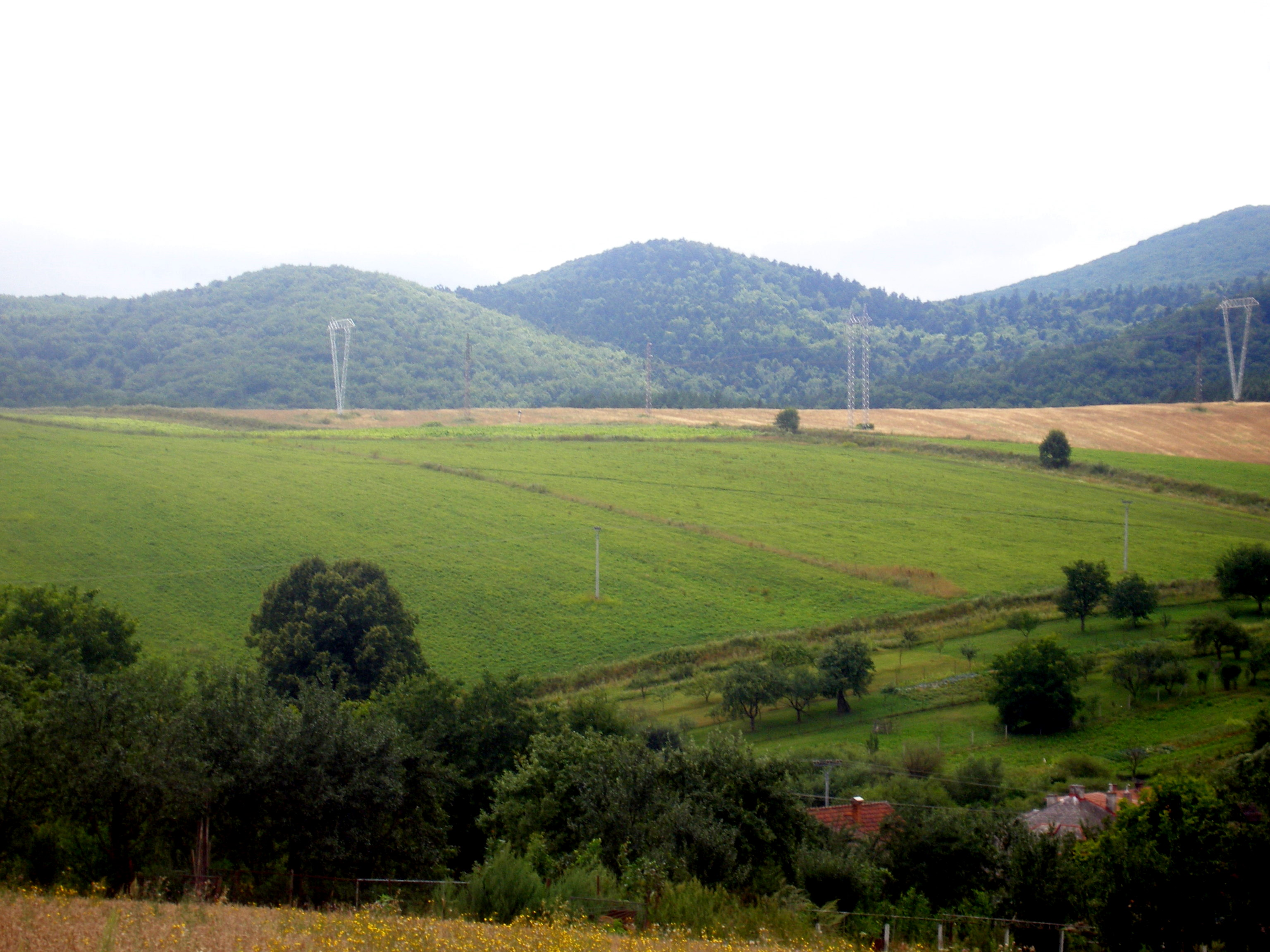 Obec Sedlice rok 2006 okres Prešov